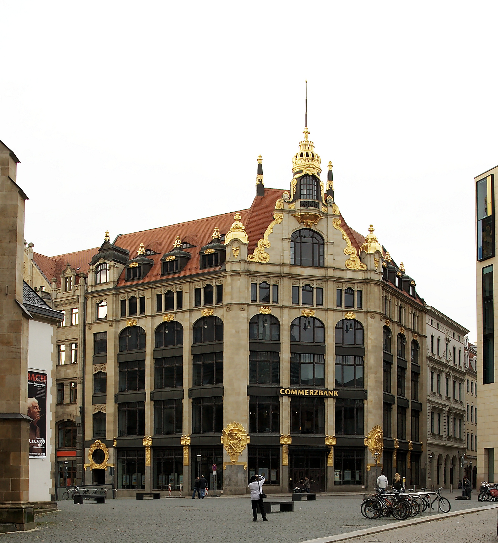 Ehemaliges Kaufhaus "Topas", heutiger Sitz der Commerzbank Thomaskirchhof 22 in Leipzig. Architekten: Schmidt & Johlige 1903/04